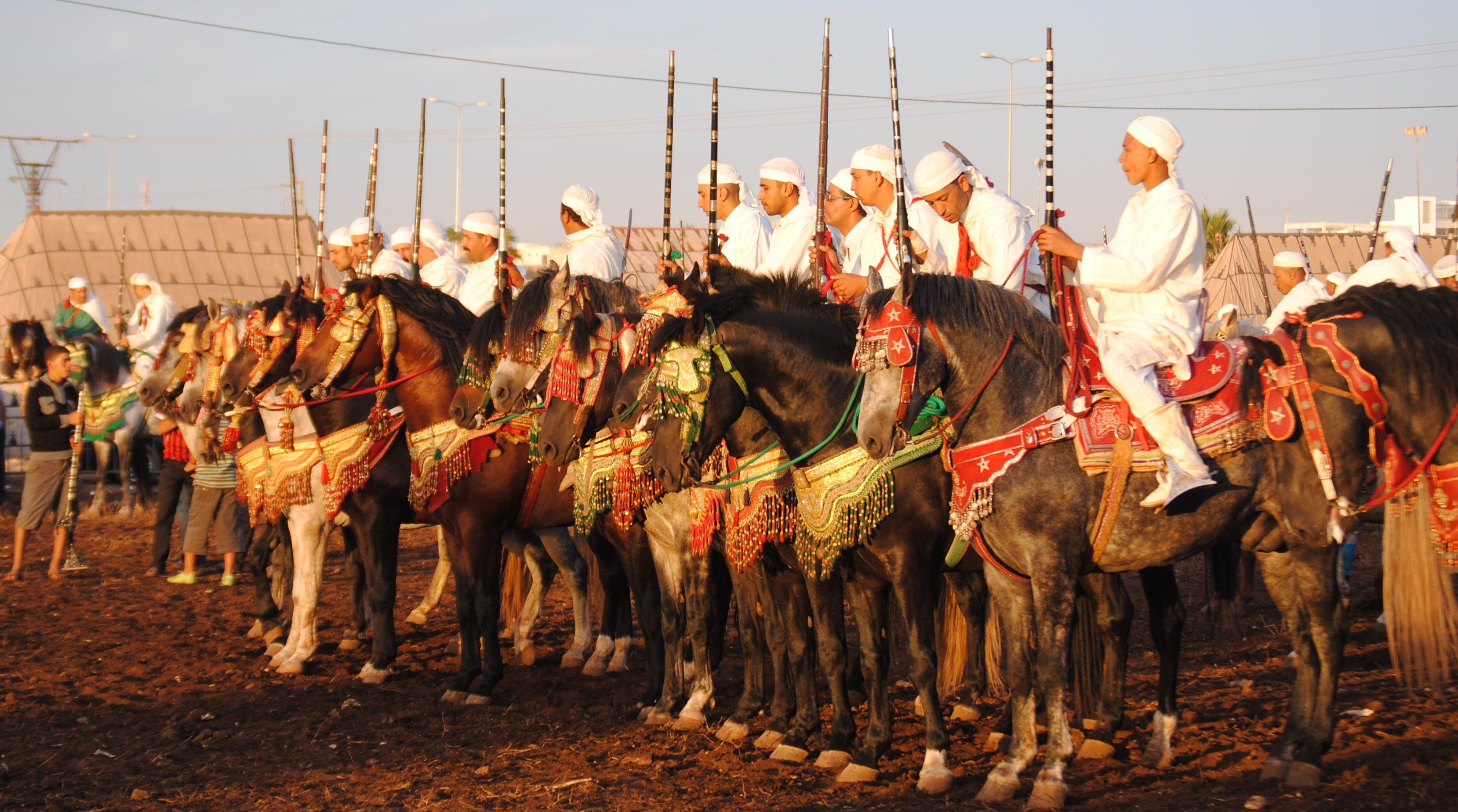 Fantasia à Casablanca